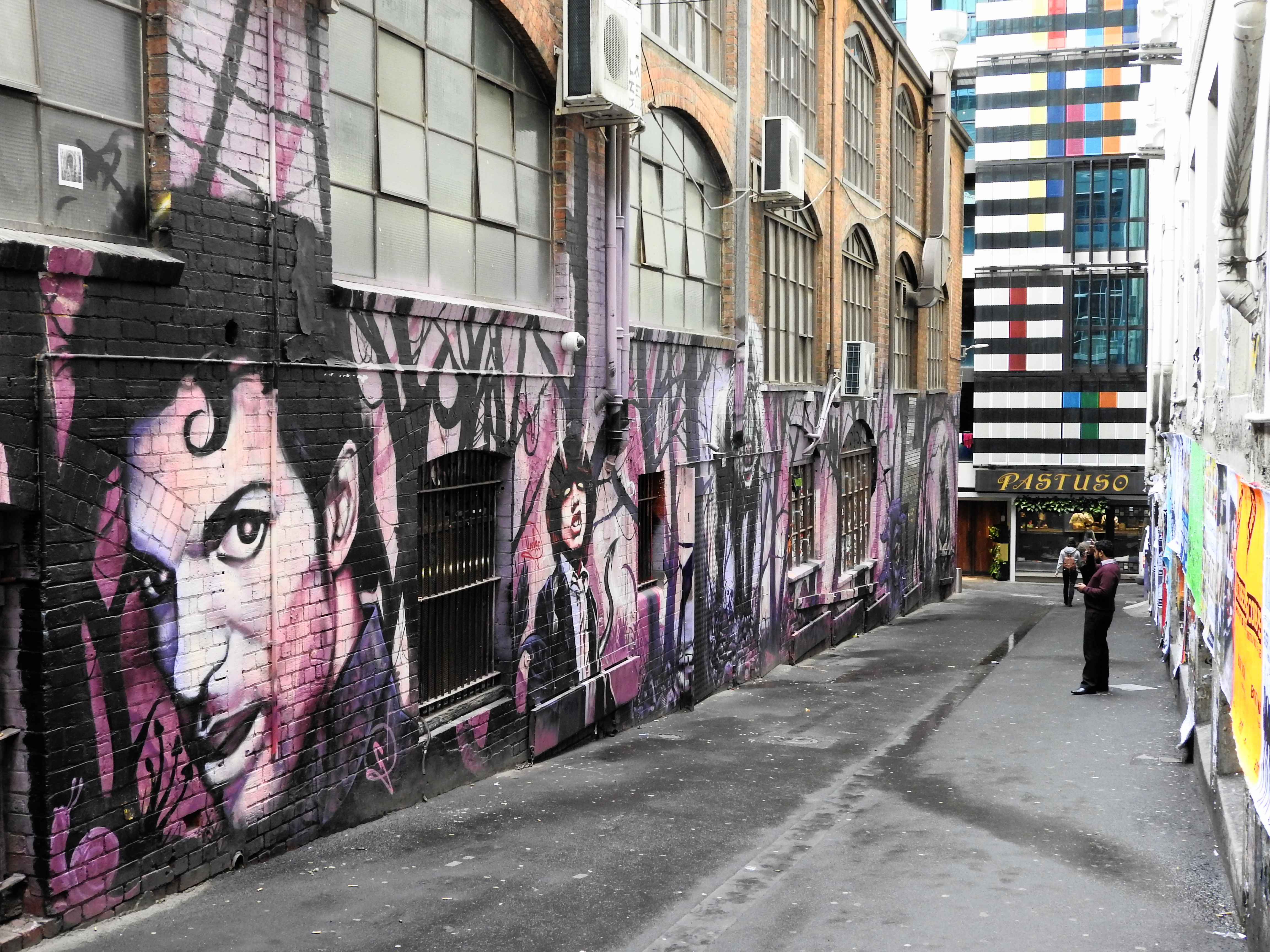 AC/DC Lane